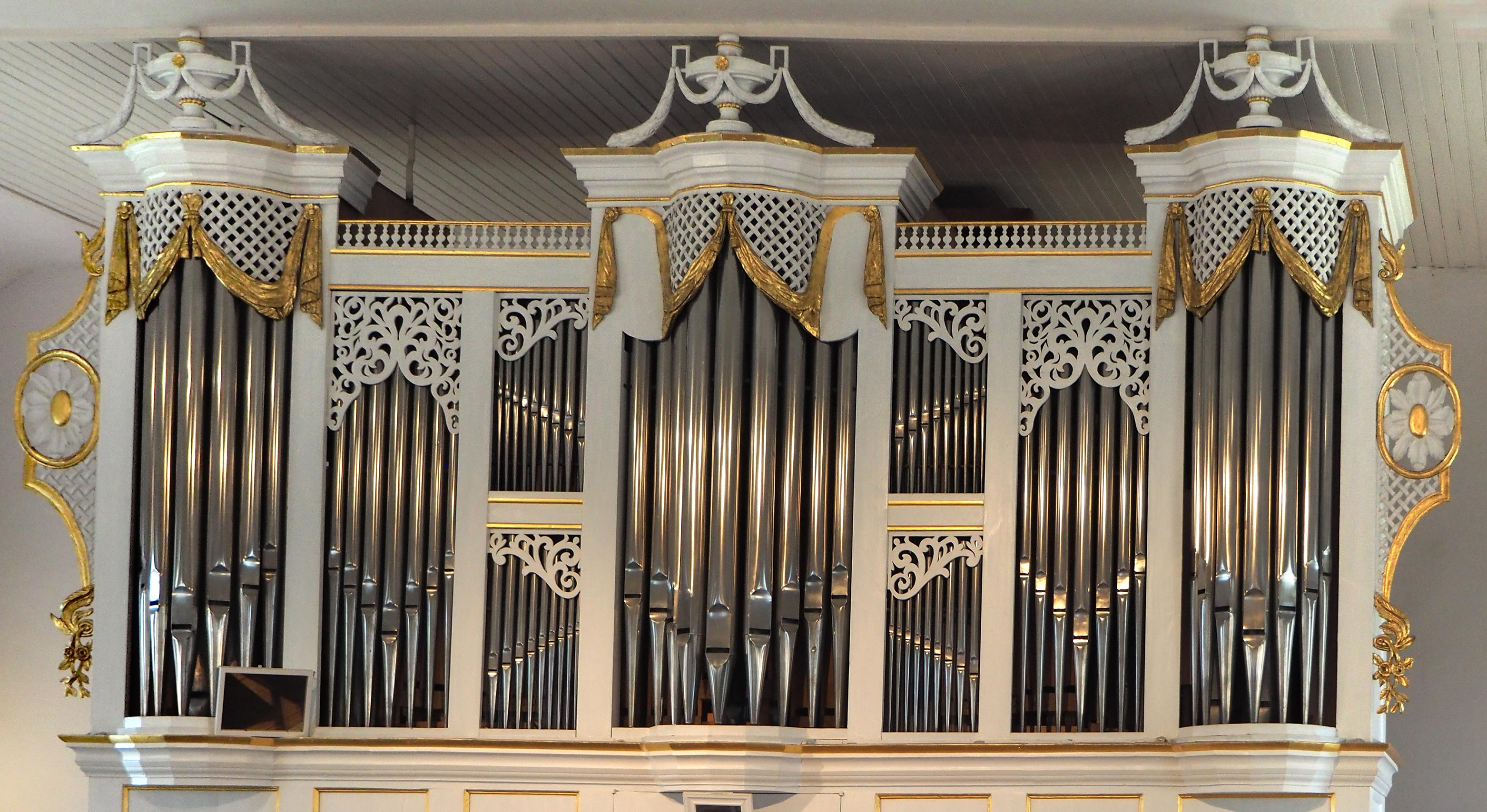 Inventar der Christuskirche Harpstedt (Niedersachsen)